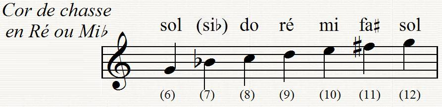 Gamme du cor de chasse. Ensembles des harmoniques utilisées dans l'exécution des morceaux. Le Sib est désuet, car faux et peu stable. Le chiffre au dessous de la note renvoi au rang de l'harmonique par rapport Ã la note fondamentale.